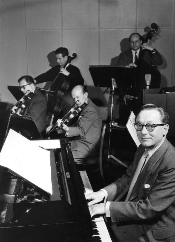 Funkhaus Köln: Hans Bund, gebürtiger Berliner, gehört mit seinem Orchester zu den Stammkapellen des Rundfunkhauses in Köln. Hans Bund ist breits seit 1932 beim Deutschen Rundfunk tätig und wurde 1946 vom Rundfunk in Köln engagiert.